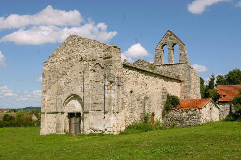 St André sans toiture, années 2000